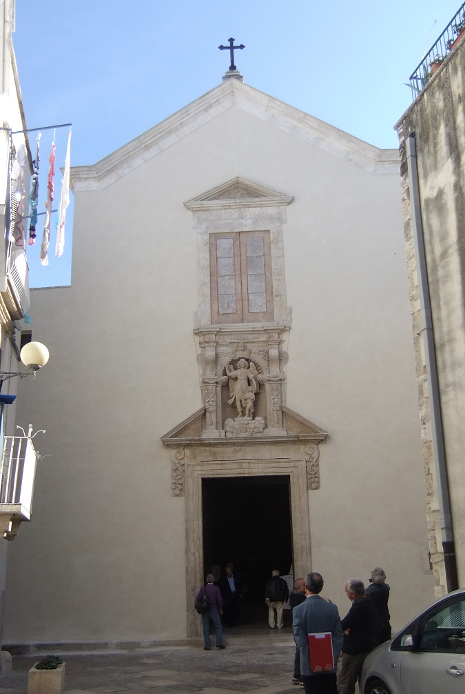 Chiesa di San Giorgio, Bitonto